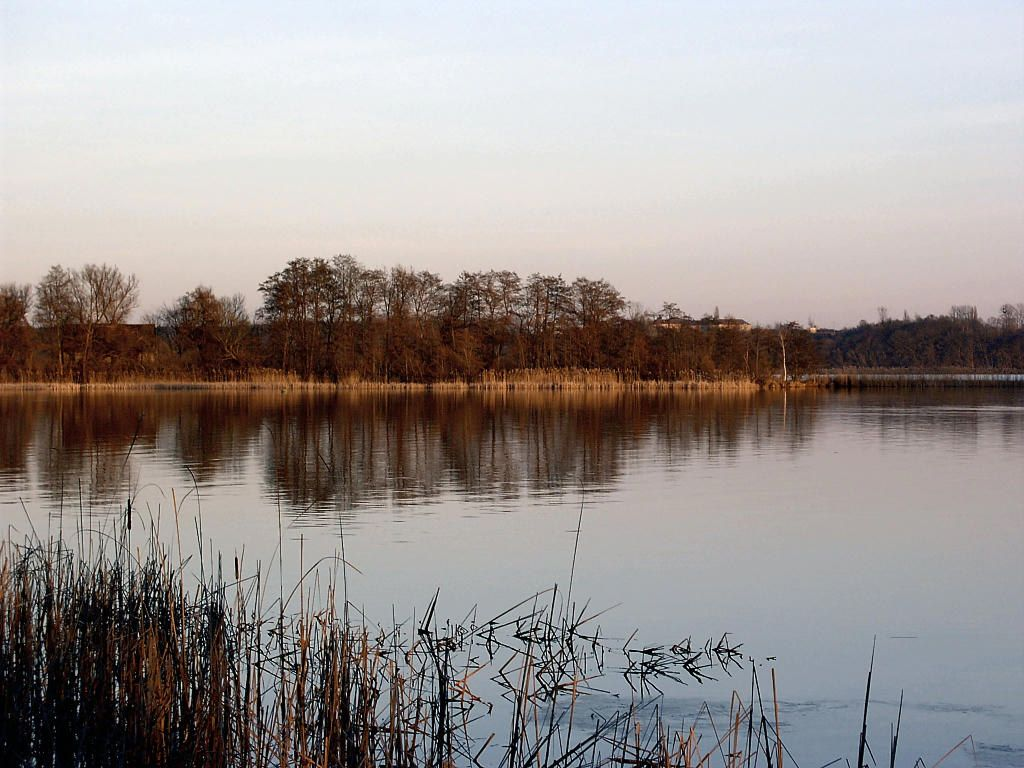 Südteil der Insel